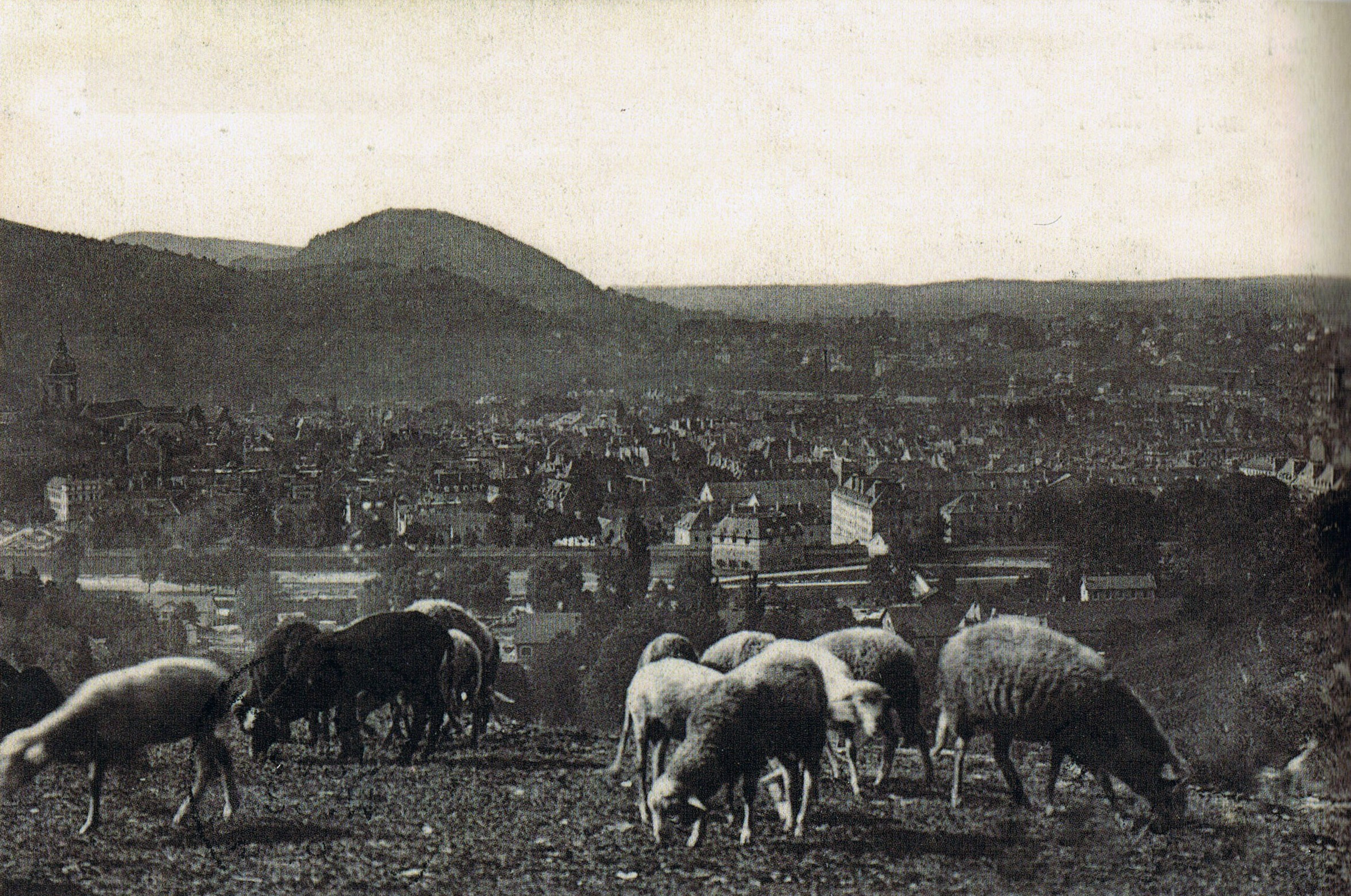 Des moutons pâturants à Bregille, en 1912.